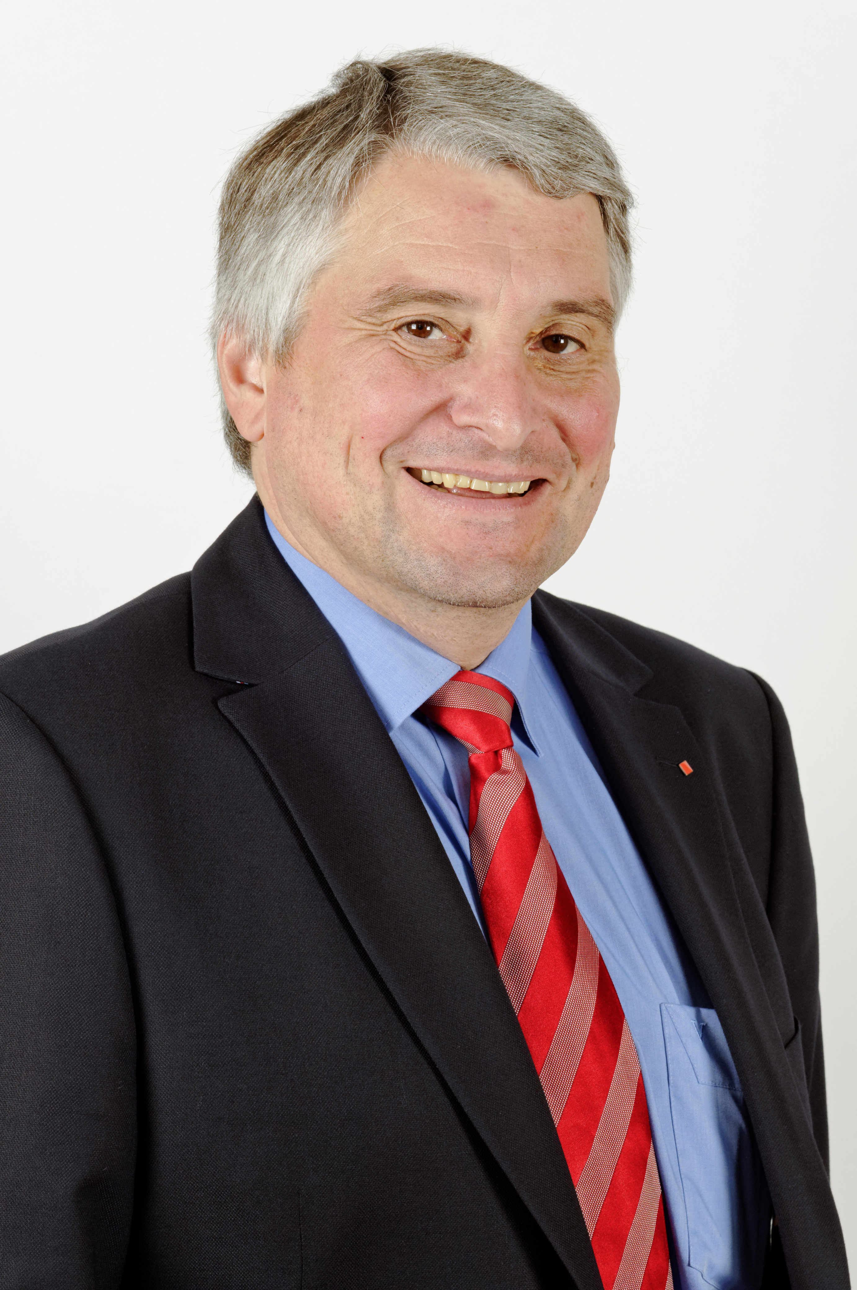 Landtagsprojekt Bayern